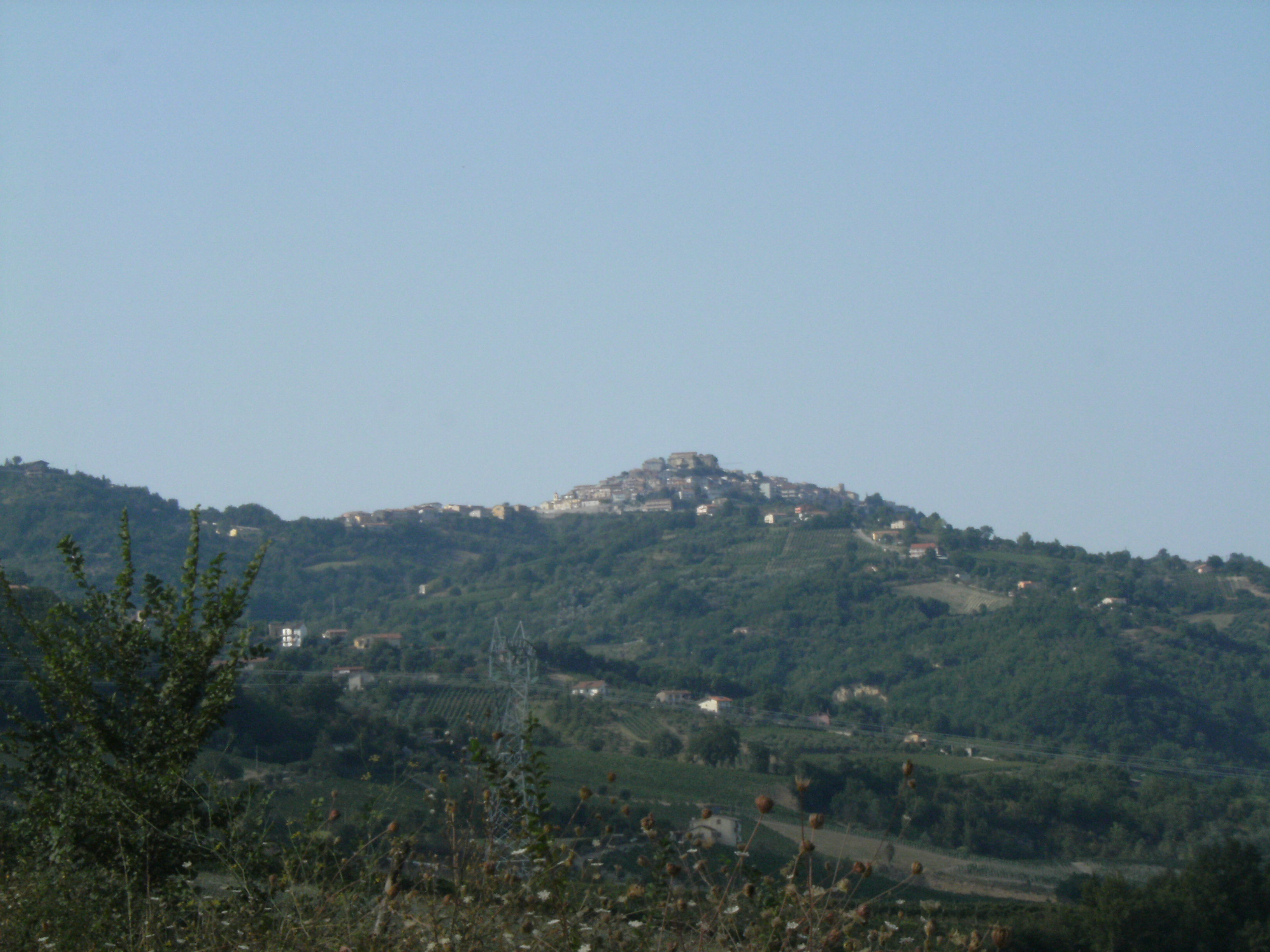 Vista di Montefusco dal comune di Pratola Serra, Provincia di Avellino.